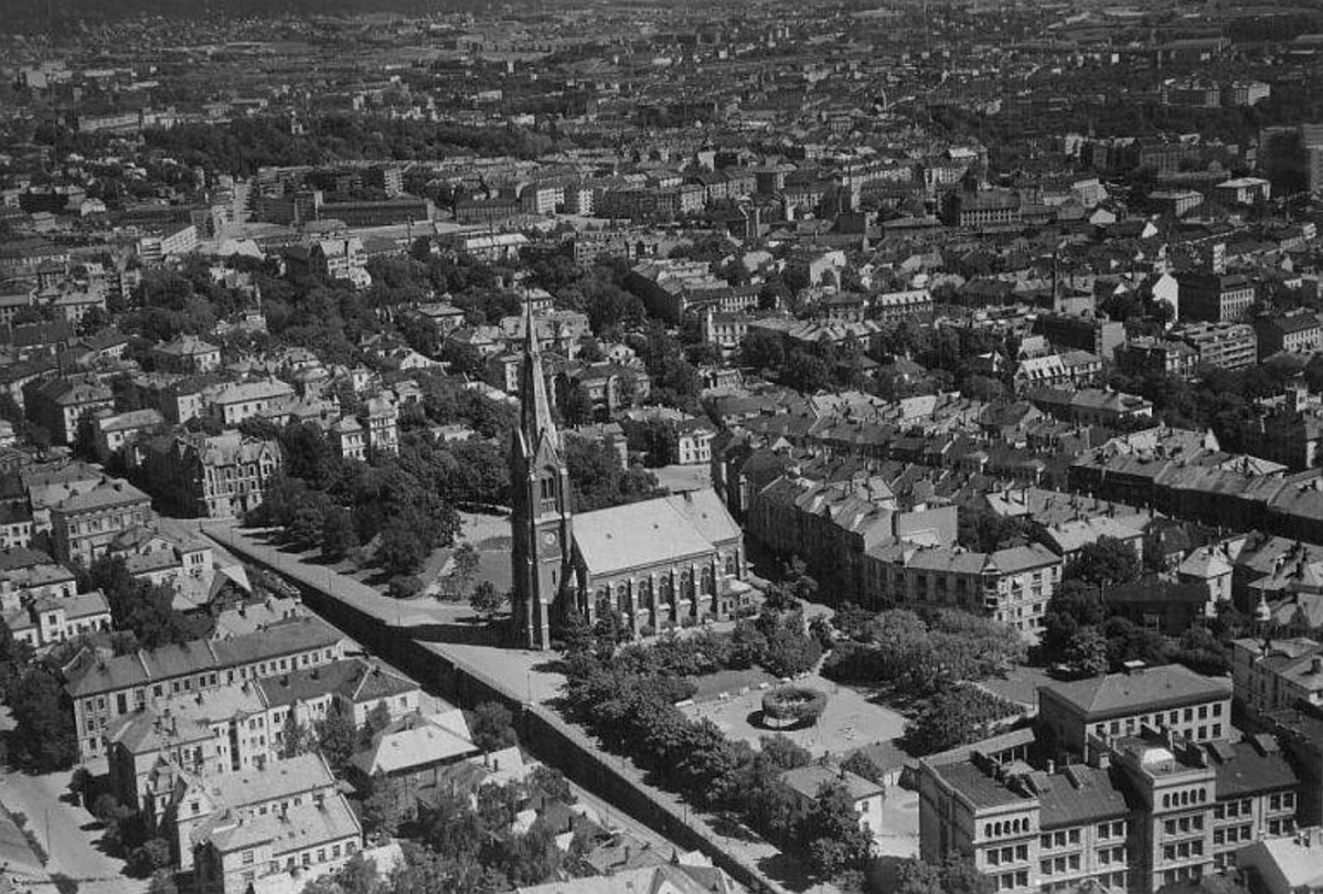 Uranienborg. Lenger bak Homannsbyen og Bislett, 1949.